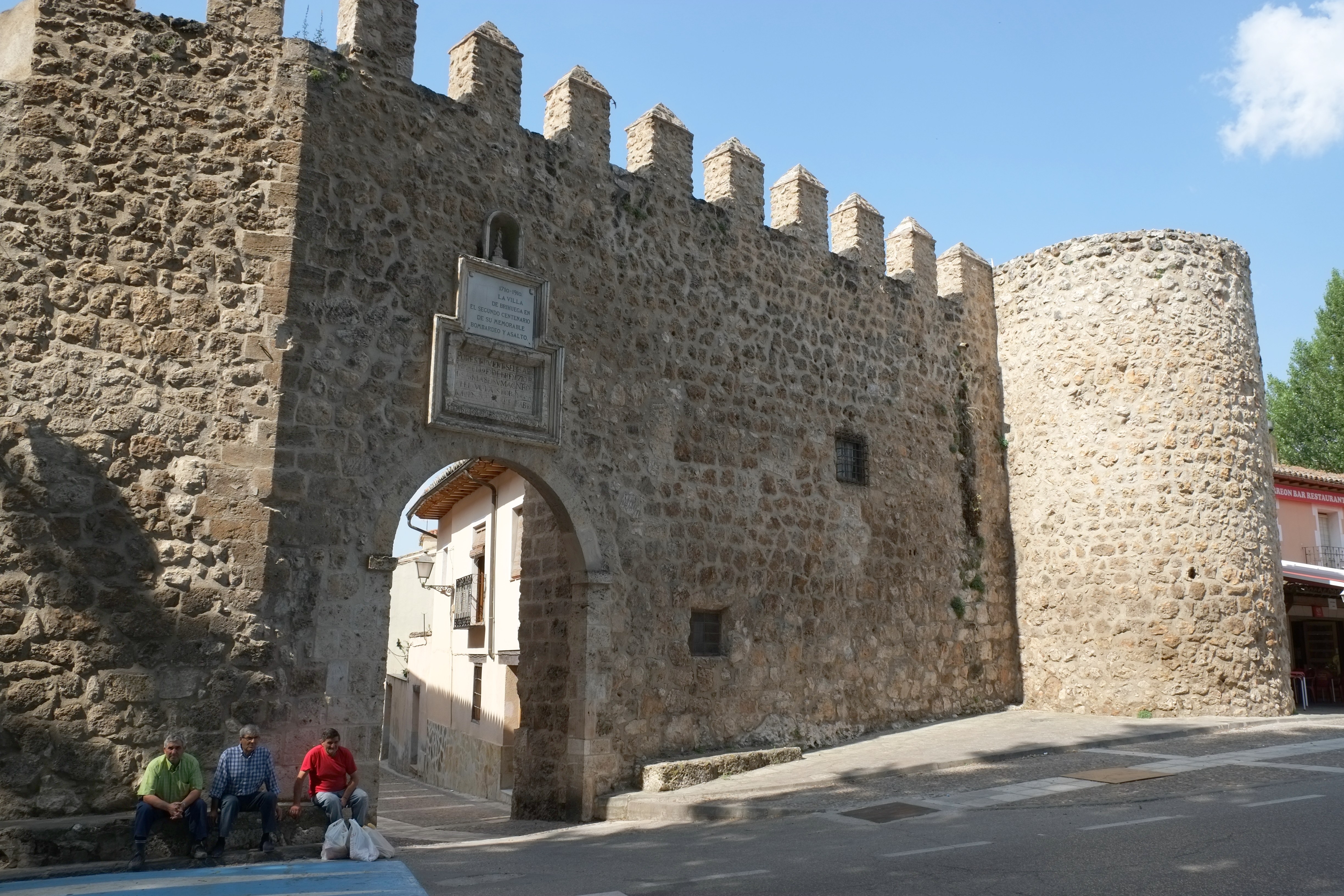 Brihuega in der Provinz Guadalajara, Spanien